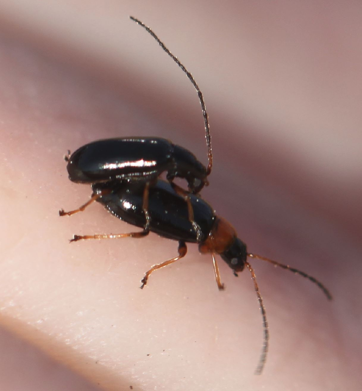 Schwarzer Weidenblattkäfer (Luperus luperus), Paarung am 3. Mai 2020 nahe Heidelberg